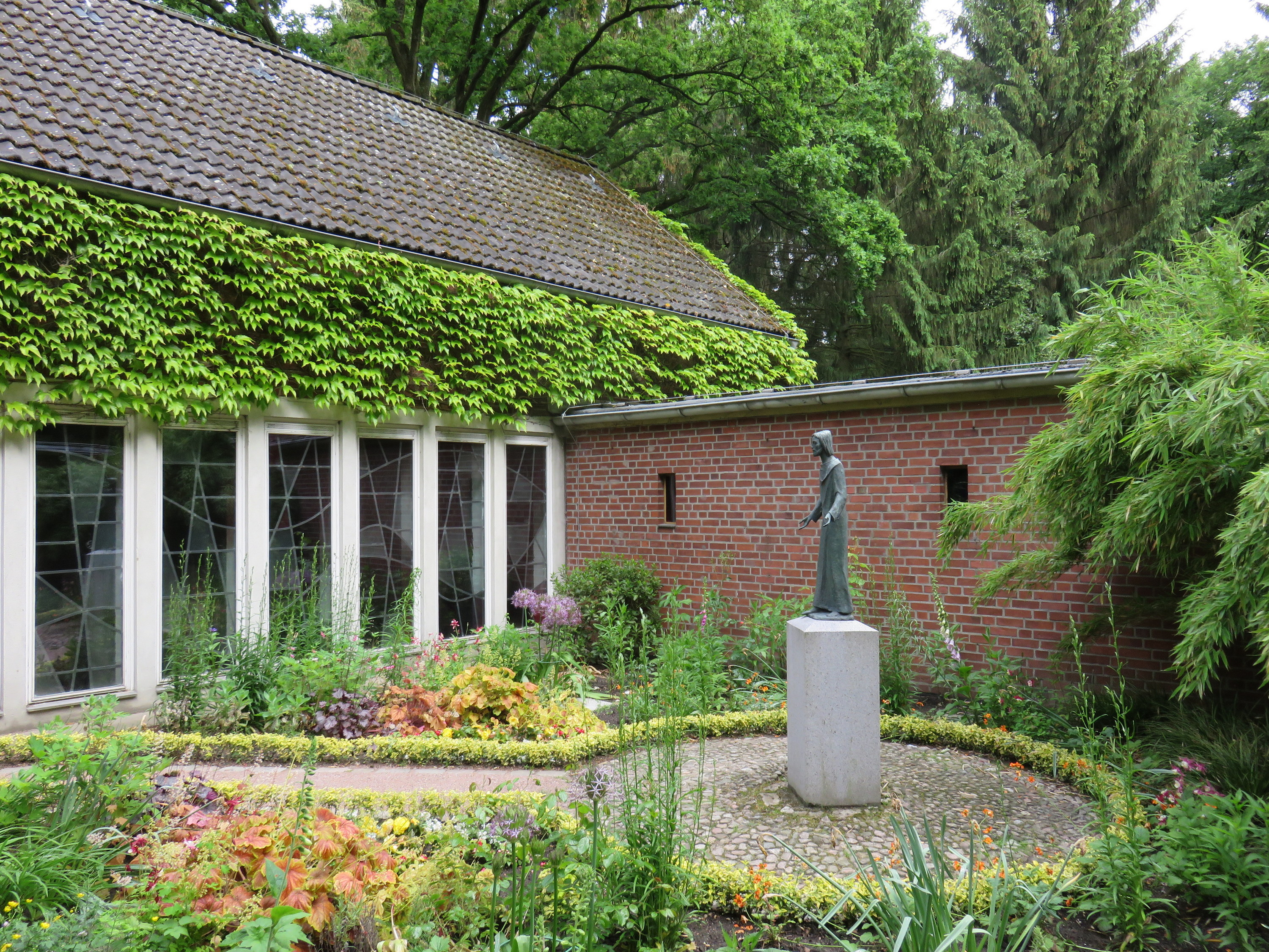 Kapellen-Innenhof auf dem Friedhof Volksdorf.